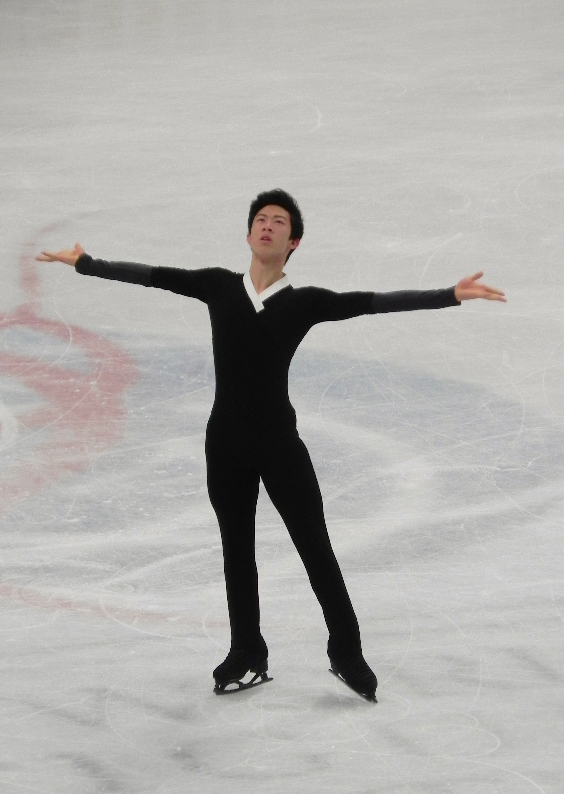 Nathan Chen, Milan 2018